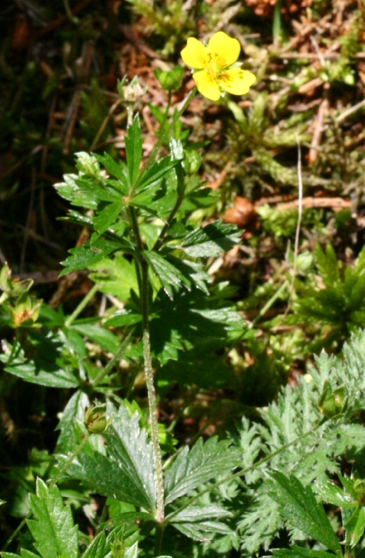 Potentilla_erecta (Cinquefoglia tormentilla) Giardino Botanico Alpino "Giangio Lorenzoni" (loc. Pian Cansiglio), Tambre d'Alpago (BL), quota 1000 m s.l.m.